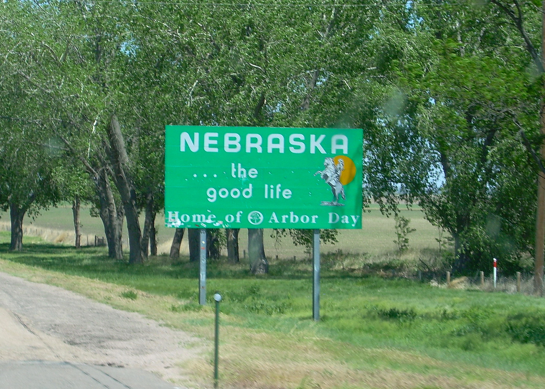 Nebraska state welcome sign